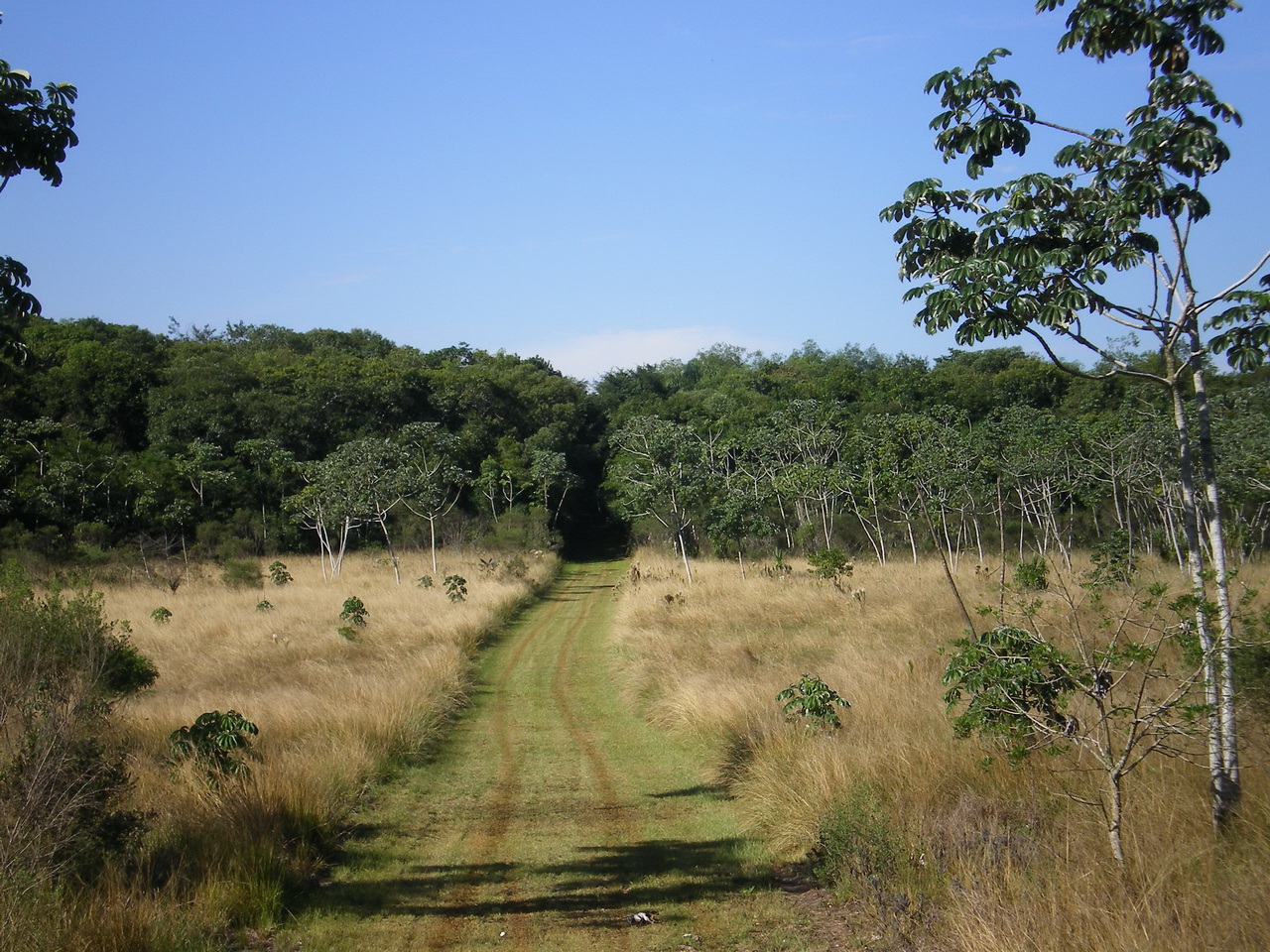 Fotos de los refugios y reservas de Itaipu, tomadas en los años 2007 y 2008 por mí